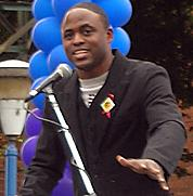 Cropped from File:Wayne Brady APLA.jpg